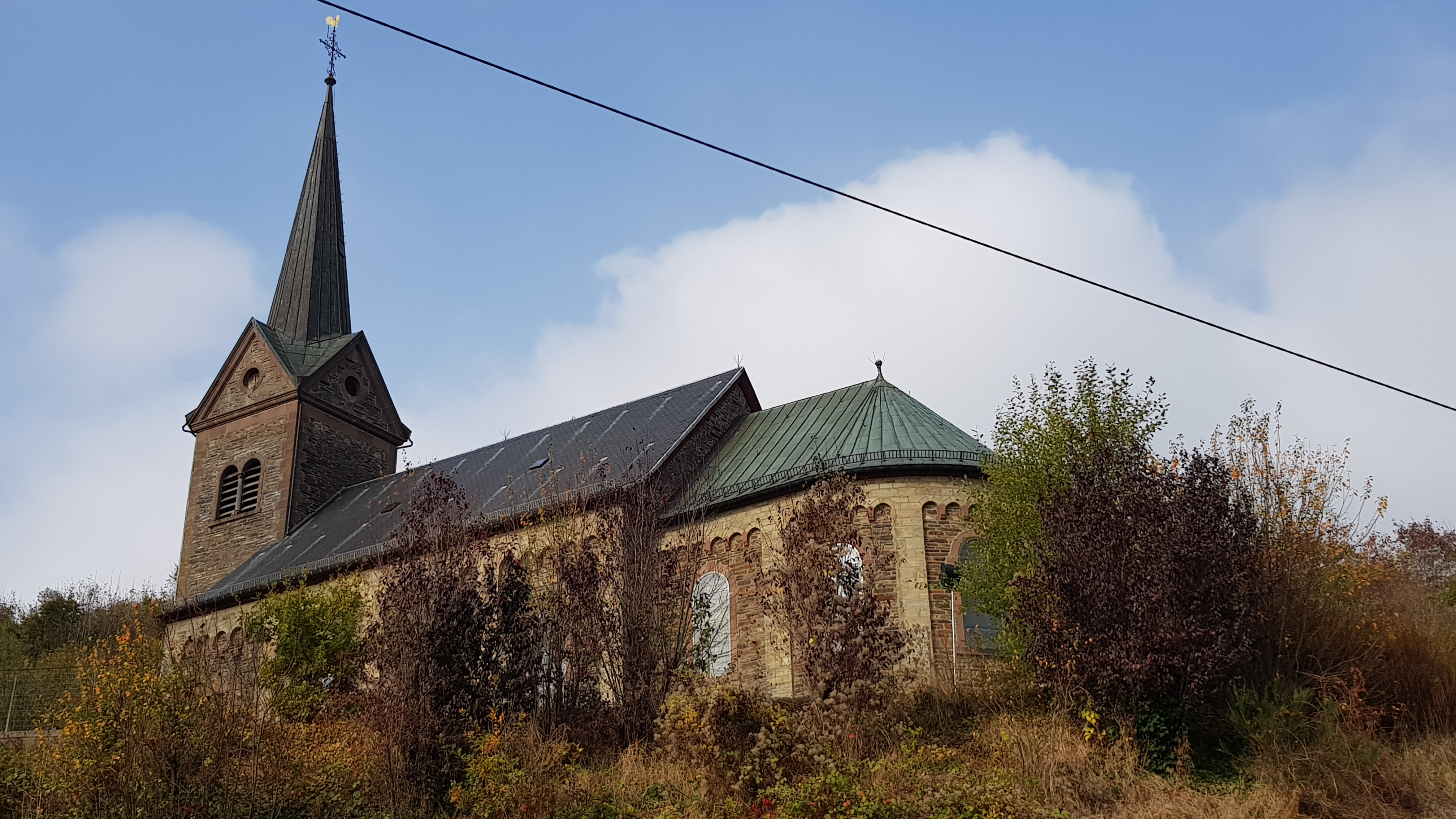 Kirche St. Matthias, Dürler, Burg-Reuland, Belgien